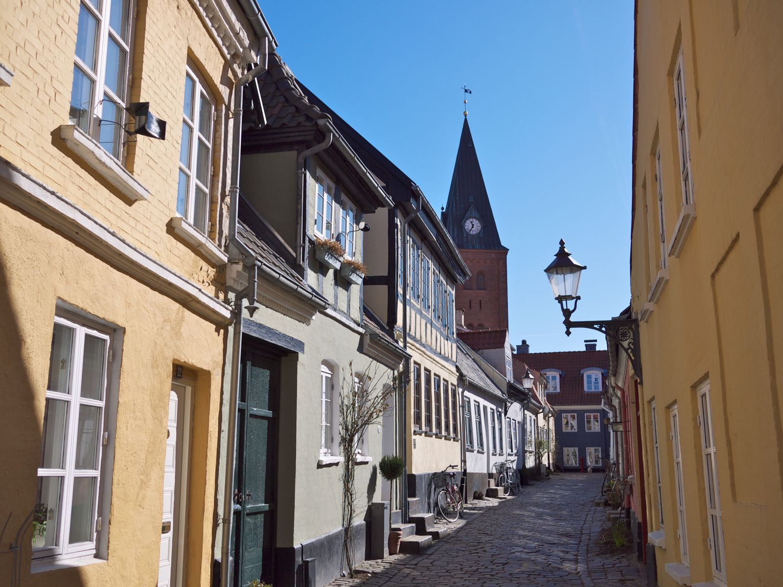 Hjelmerstald